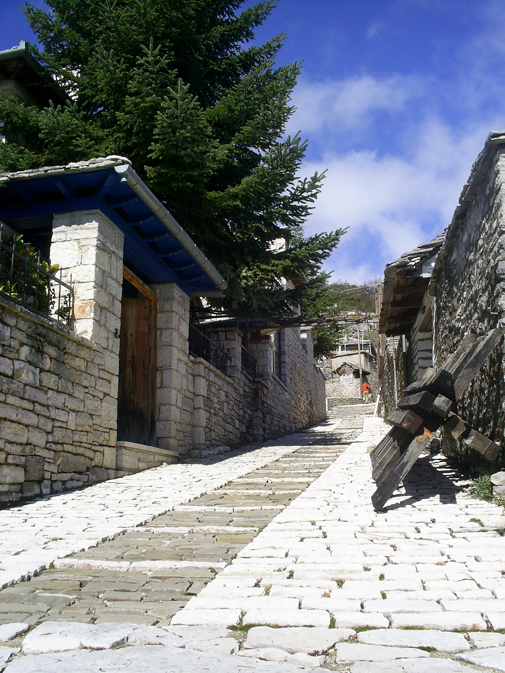 Μονοδένδρι«Μονοδένδρι»